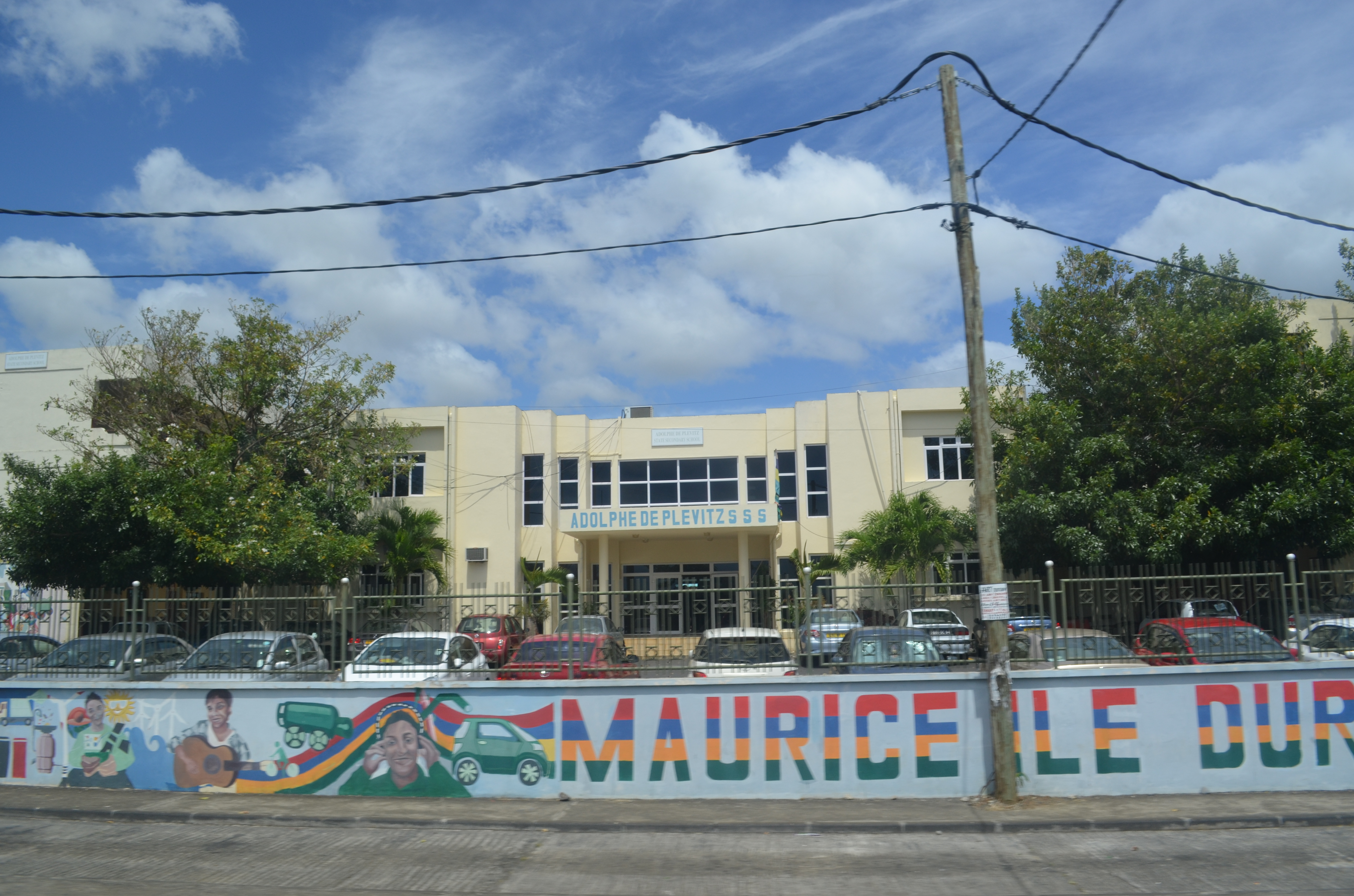 Grand Baie, Adolphec de Plevitz State Secondary School